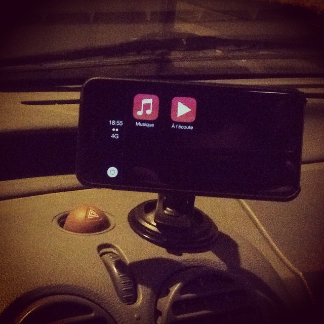 Version non-officielle de CarPlay iOS en condition réelle d'utilisation sans sytème embarqué.